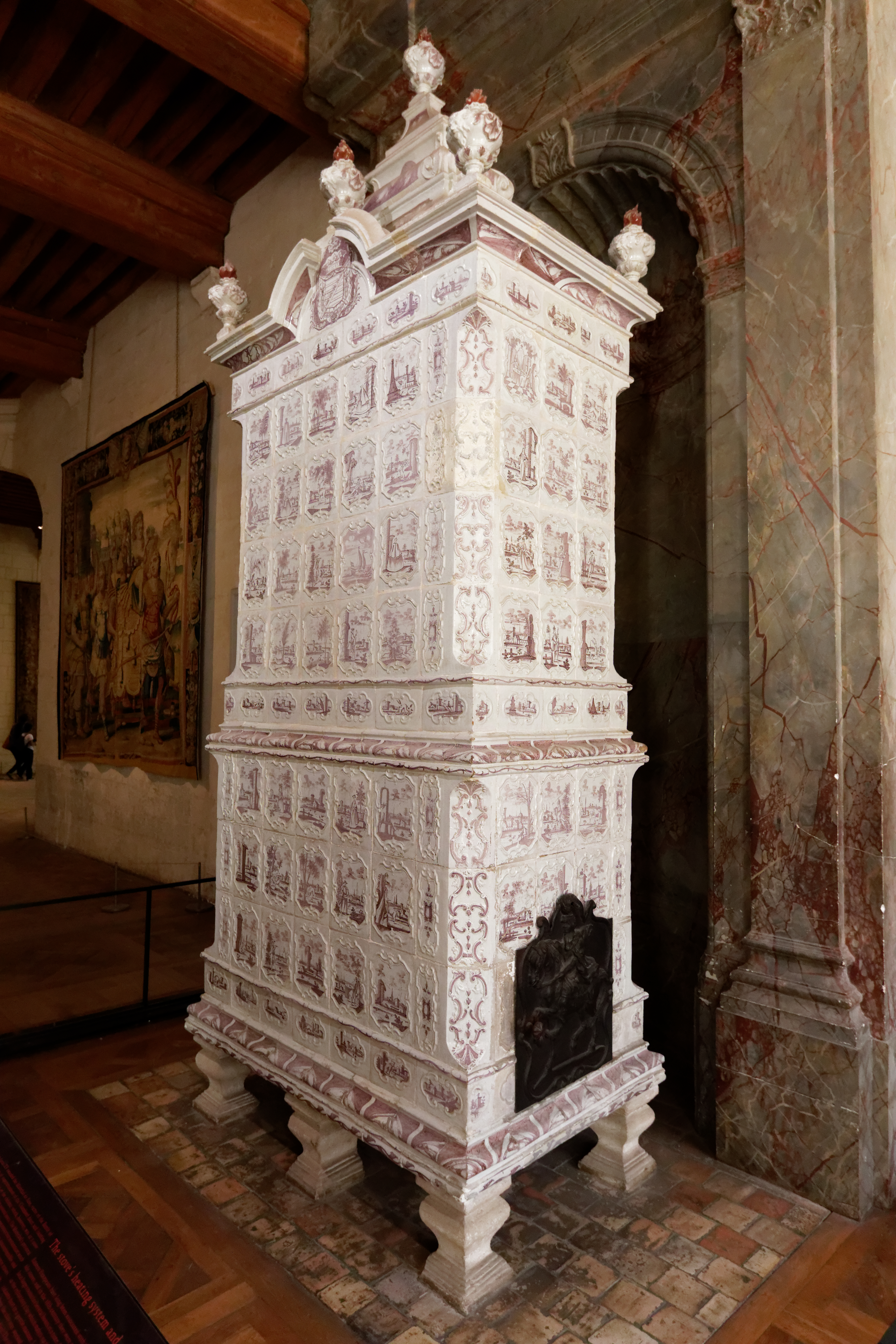 Une vue intérieure du château de Chambord.